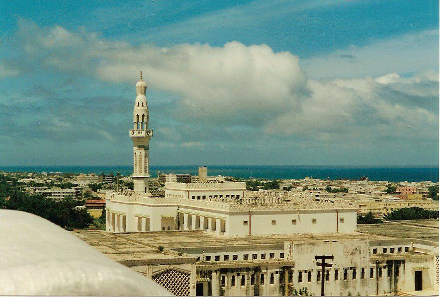 Isbaheysiga Mosque in Mogadishu